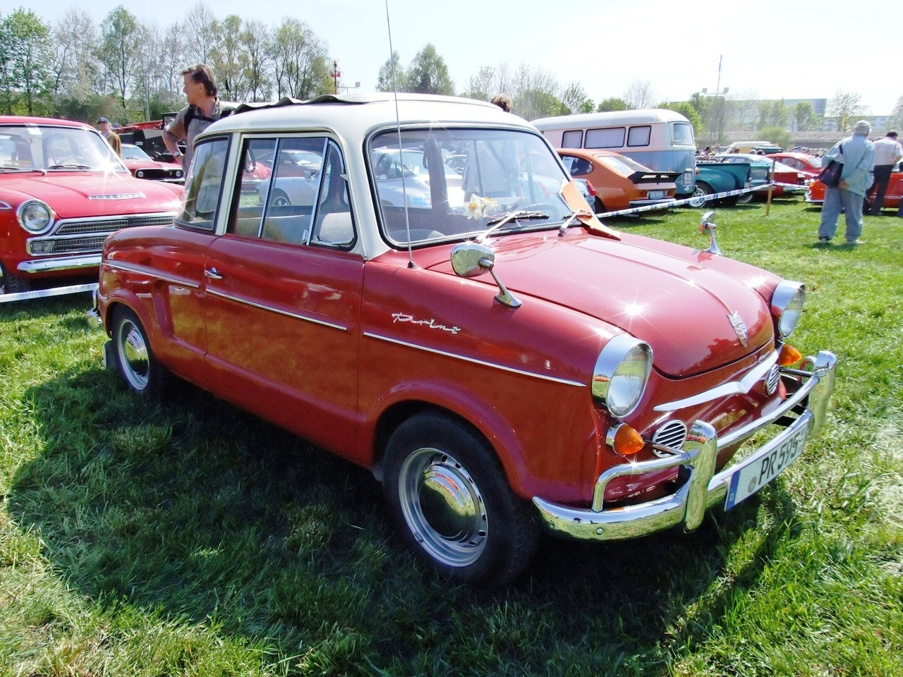 Quelle: selbst fotografiert, 04/2007 Fotograf: Späth Chr.